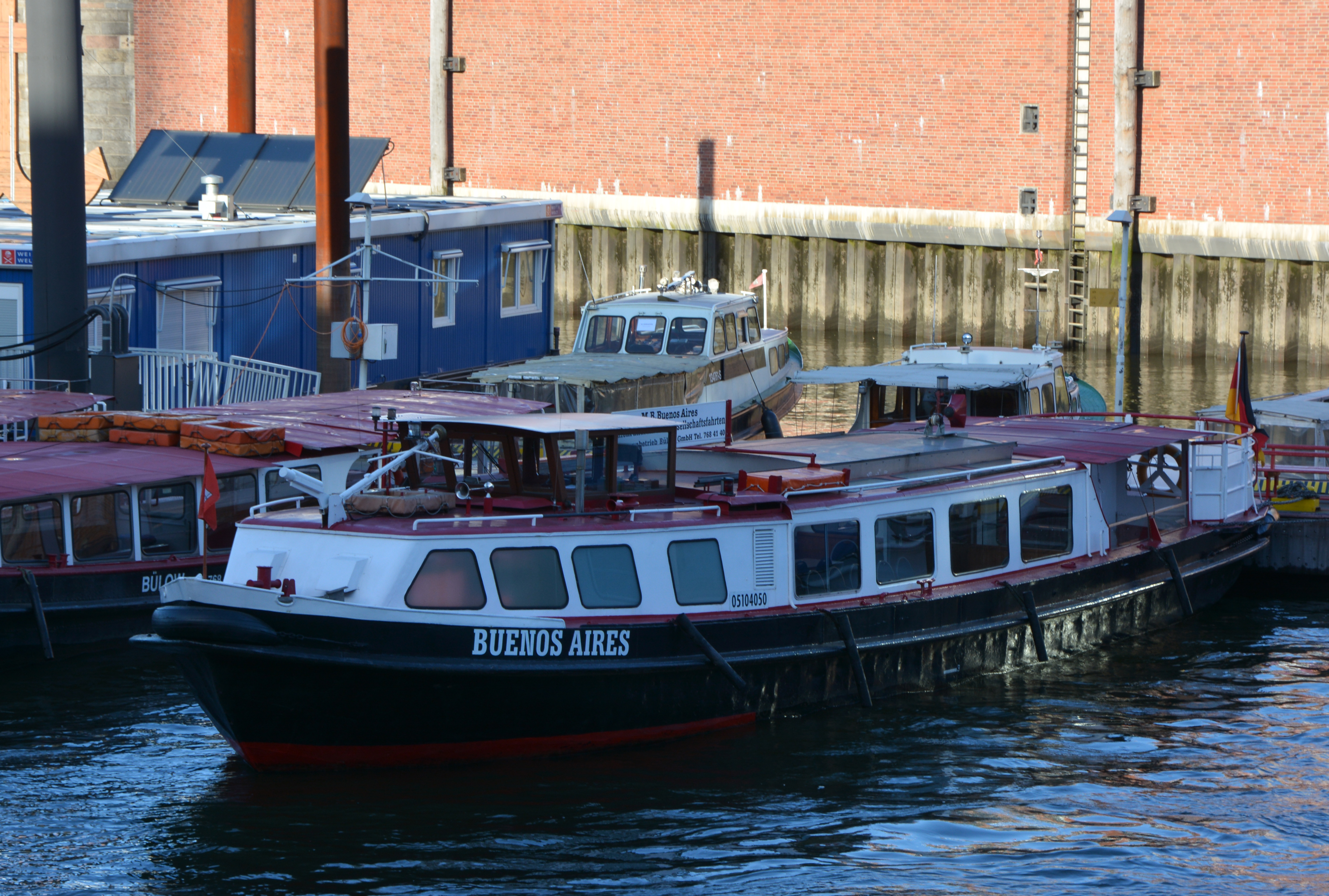 Die Barkasse Buenos Aires im Hamburger Hafen Bauwerft: Franke Werft Bauort: Berlin Baujahr: 1964 Länge: 21,14 m Breite: 5,35 m Tiefgang: 1,62 m Max. Passagiere: 84 Machinenleistung: 155 kw Hafennummer H5104050